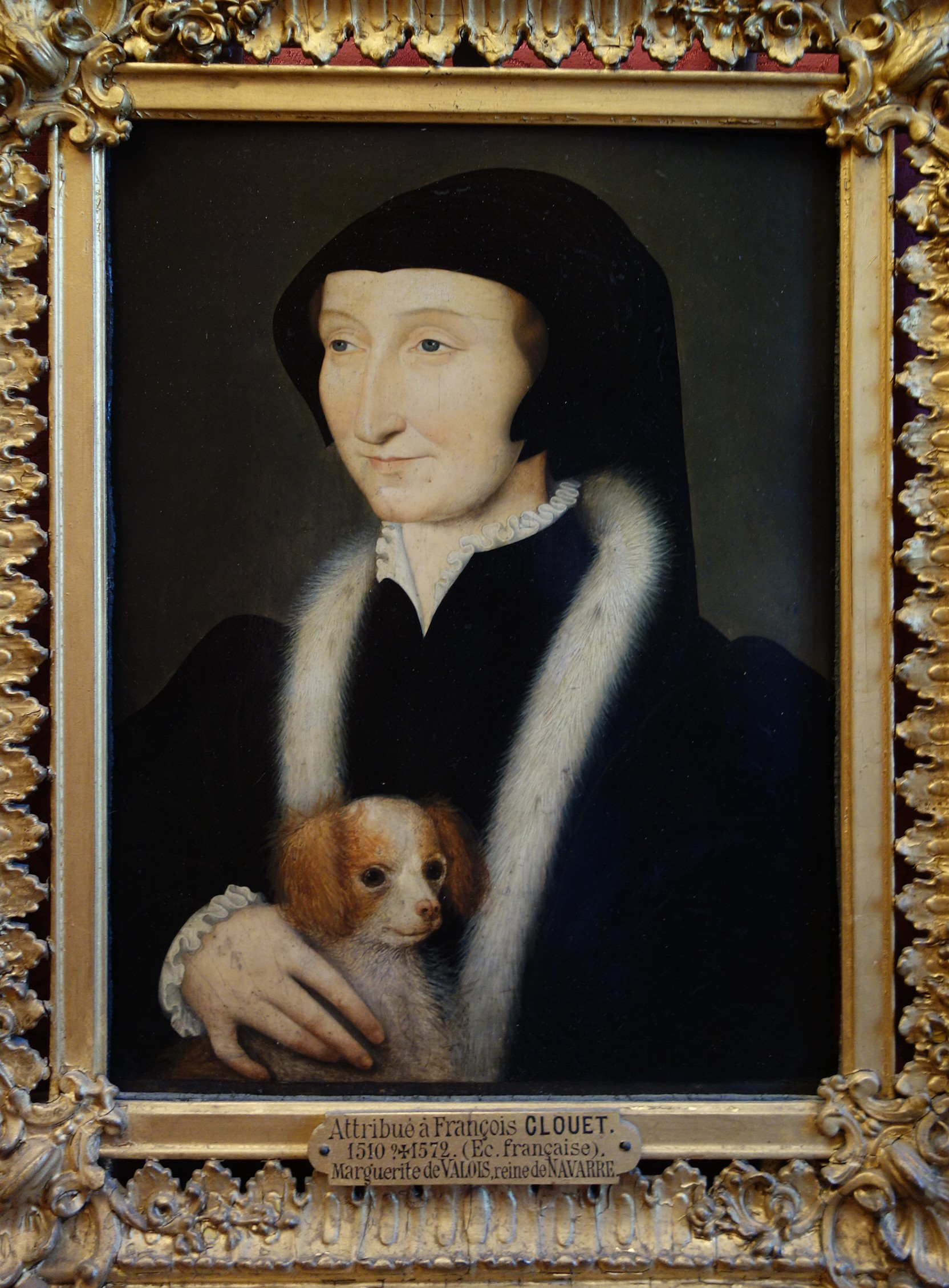 Portrait de Marguerite de Navarre (1492-1549), attribué à François Clouet (1510?-1572), musée Condé